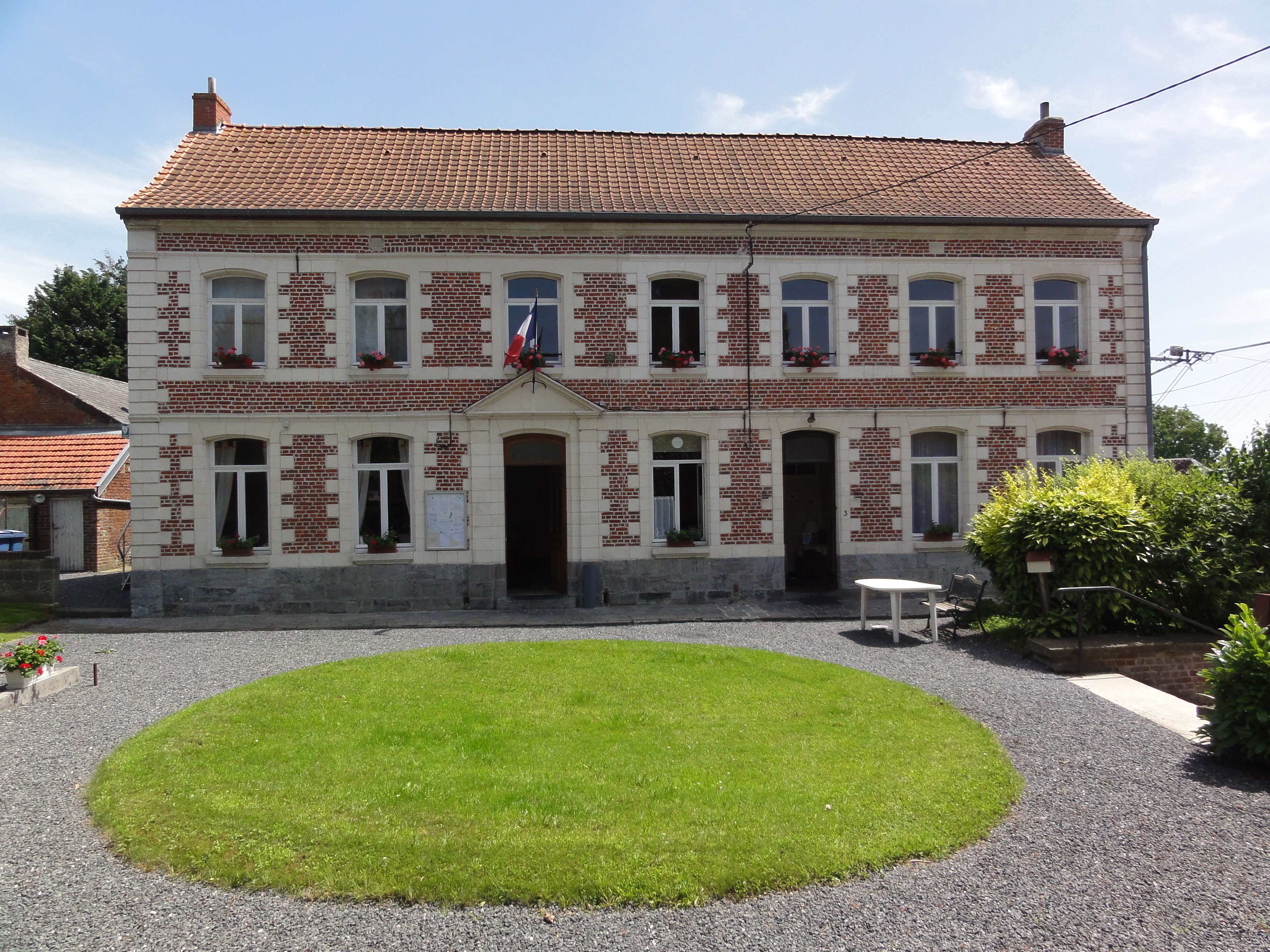 Bettrechies (Nord, Fr) mairie